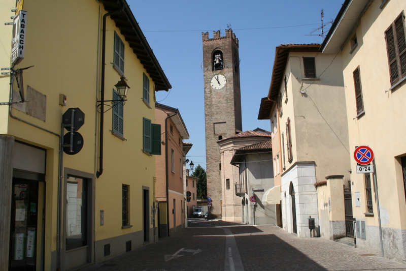 Fontanella BG, Torre